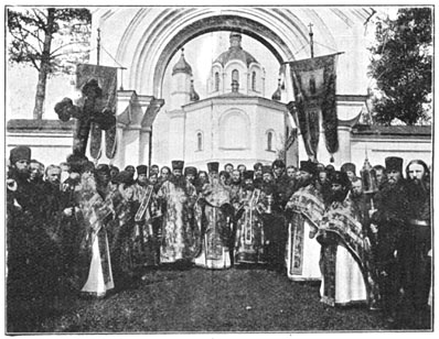 "Priesters voor de kerk op Walamo"